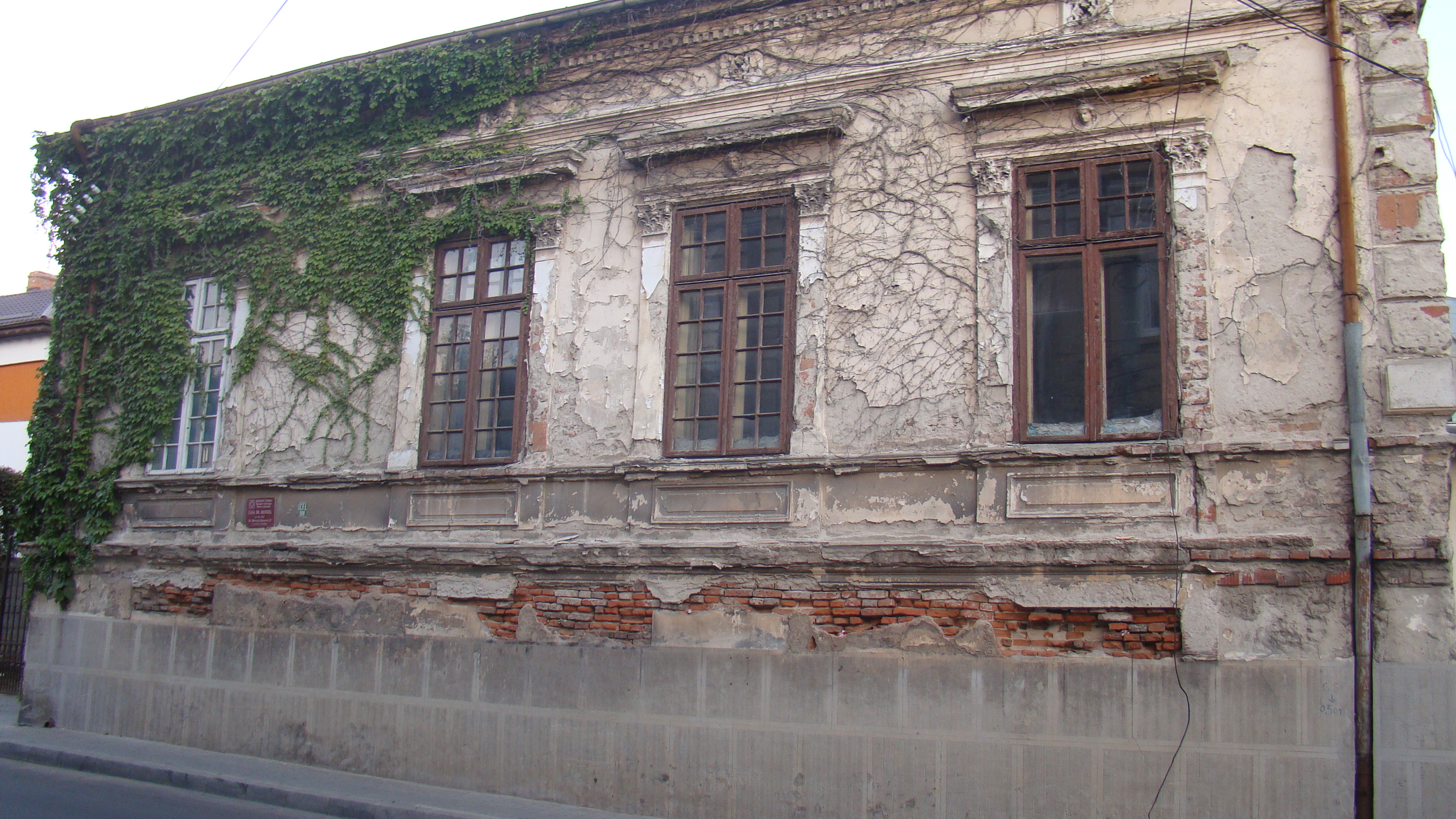 Casa dr. Mendel